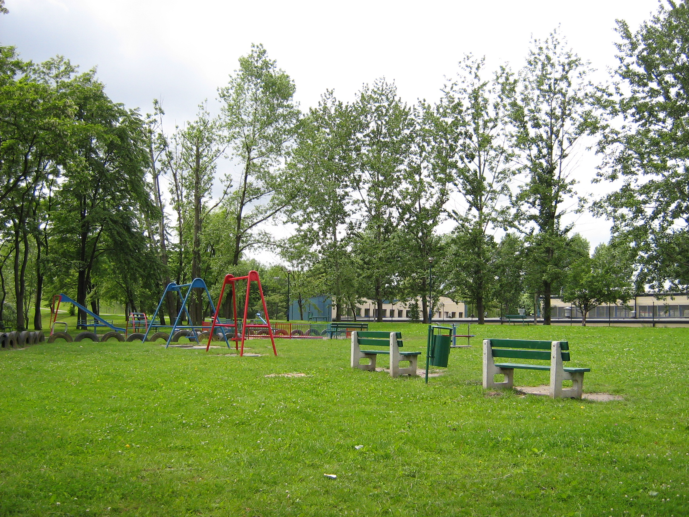 Plac Zabaw na Dąbiu